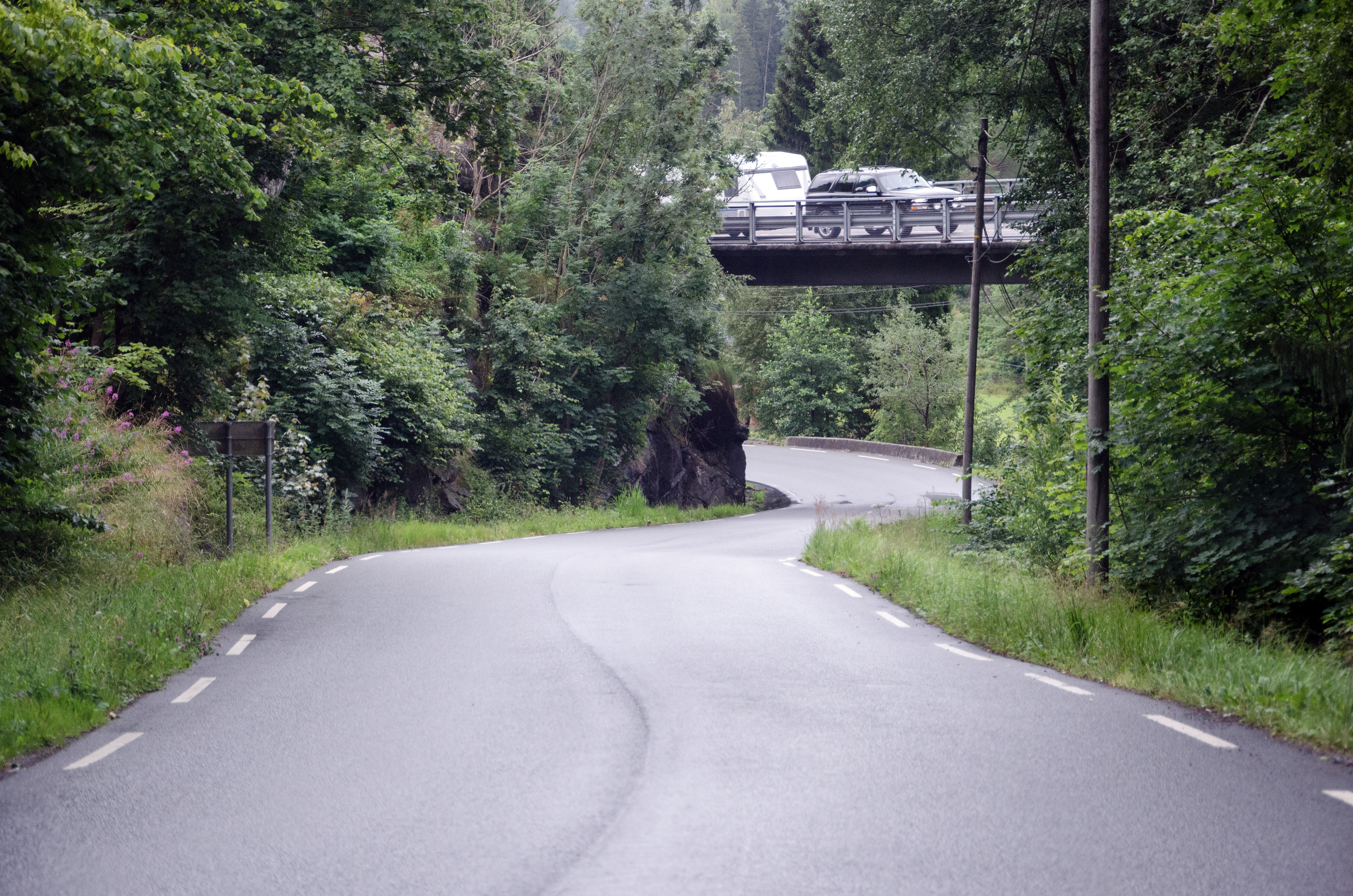 Telemarks fylkesvei 208